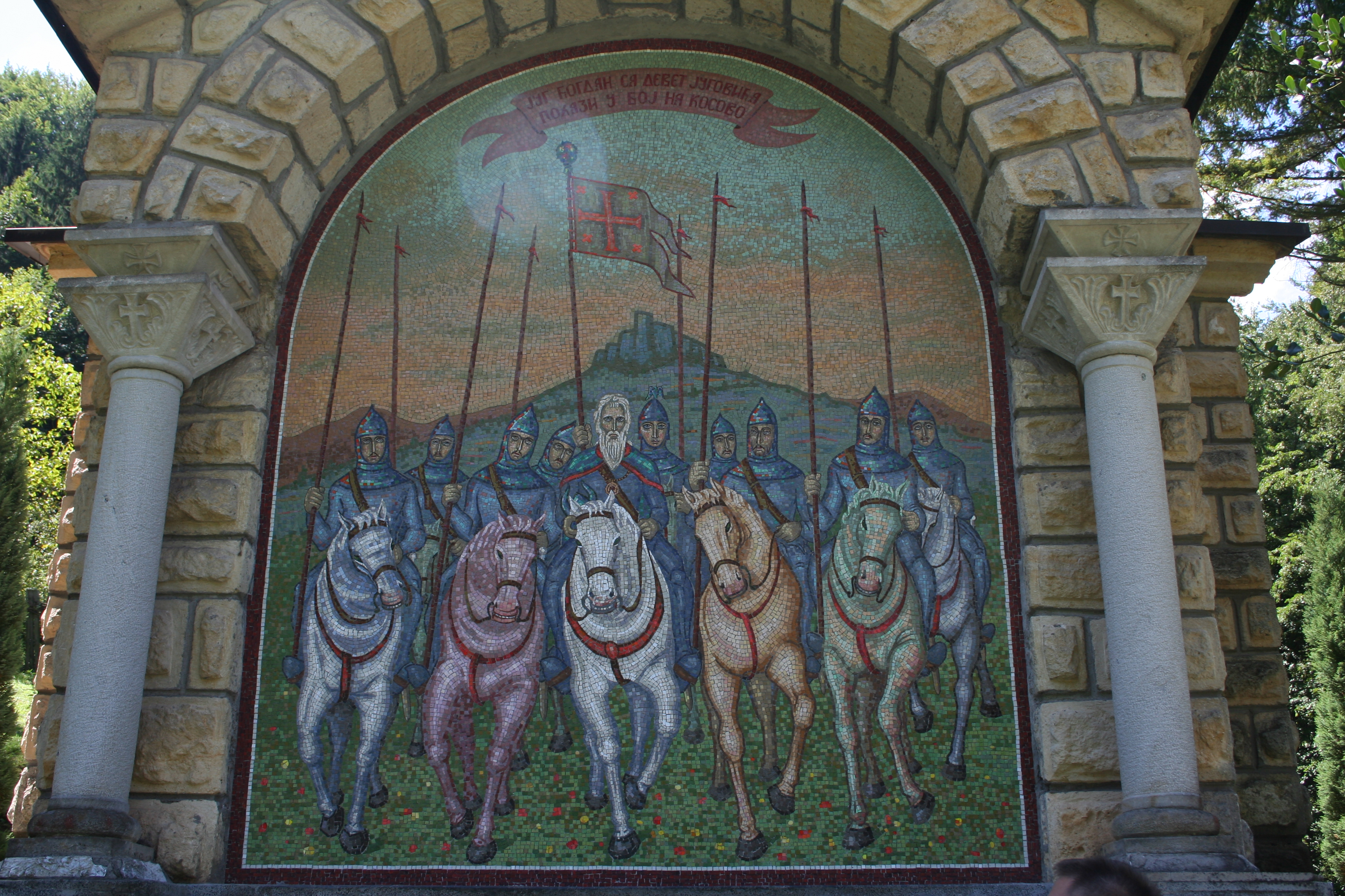 Kapela Sv. Pantelejmona sa česmom devet Jugovića